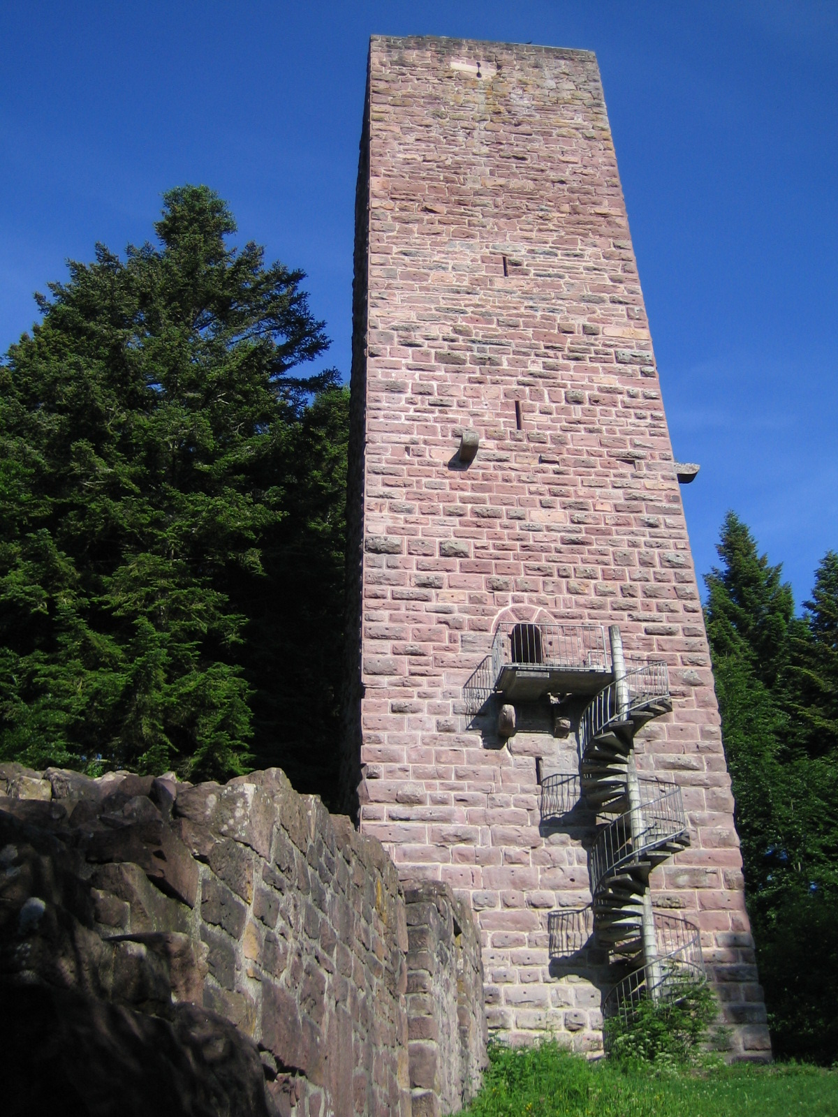 Im Jahr 1975 renoviert wird er noch als Aussichtsturm genutzt.